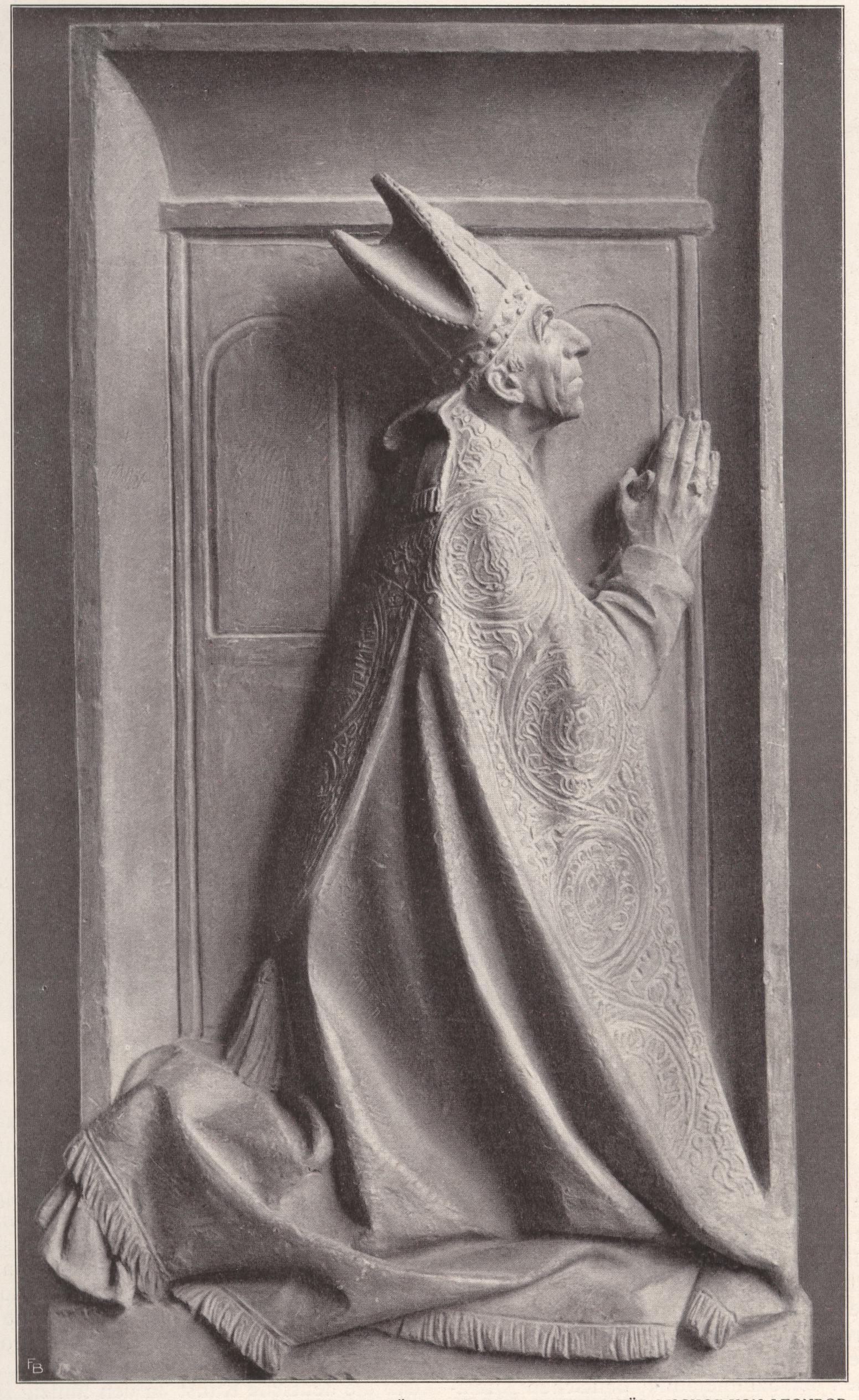 Bischof Paul Leopold von Leonrod, Eichstätt, Grabmal